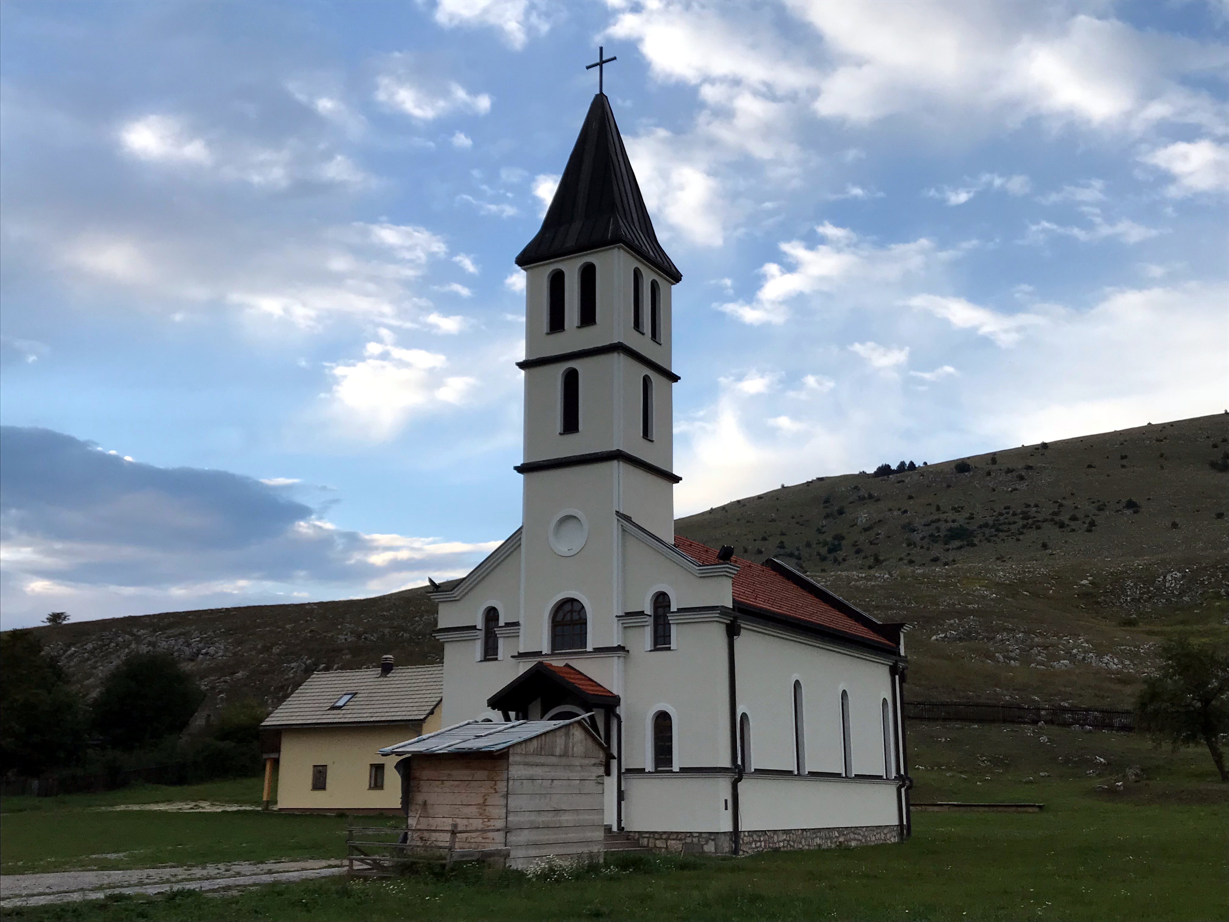 Kostel sv. Ilije Proroka v Bosně a Hercegovině v obci Obljaj - rodiště atentátníka Gavrilo Principa.